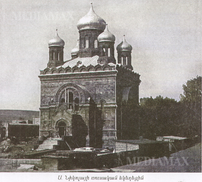 Սուրբ Նիկոլայ եկեղեցի